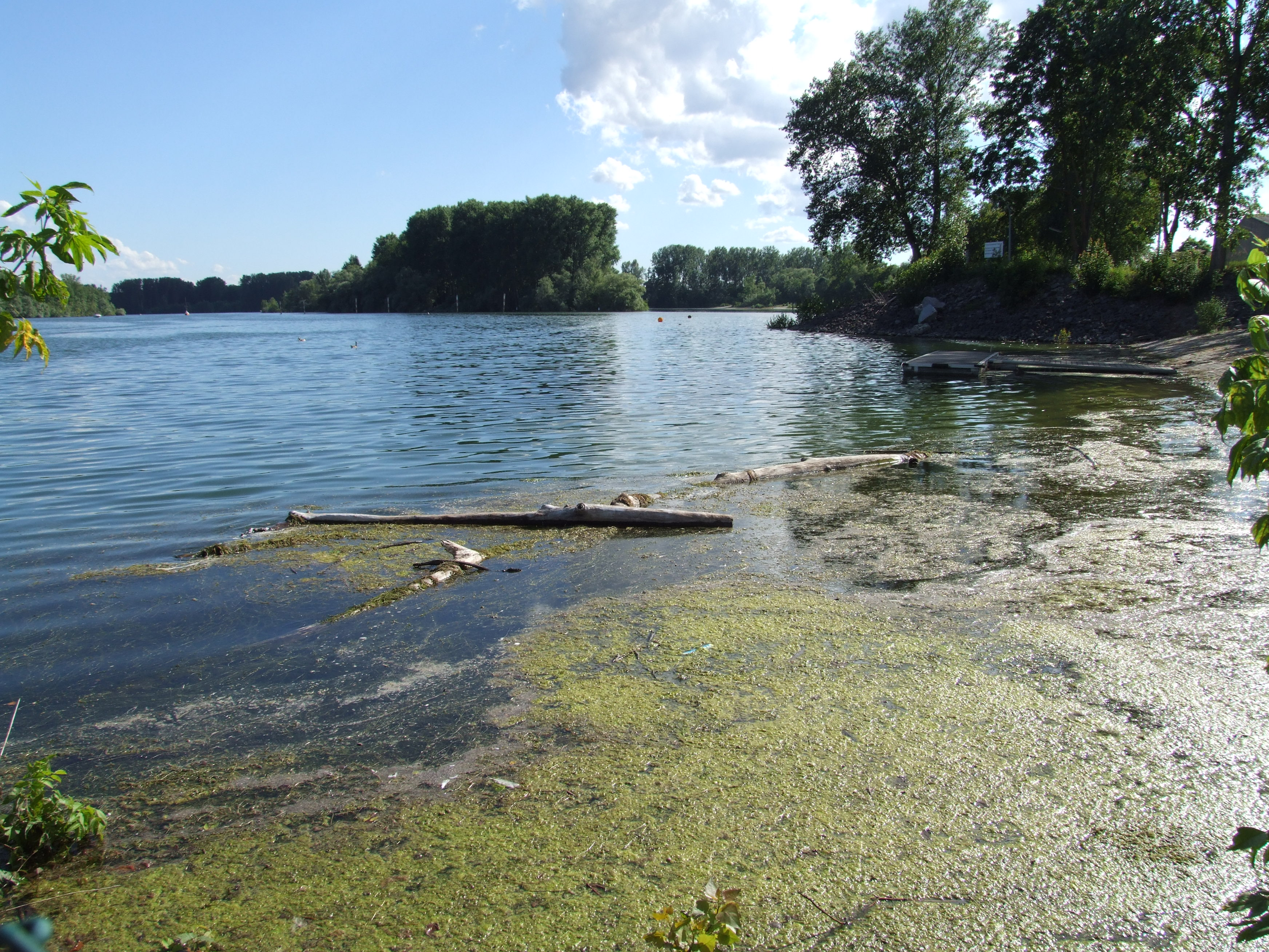 Angelhofer Altrhein - nördlicher Bereich mit Campingplatz und Bootsliegeplätzen - Algen und Treibgut